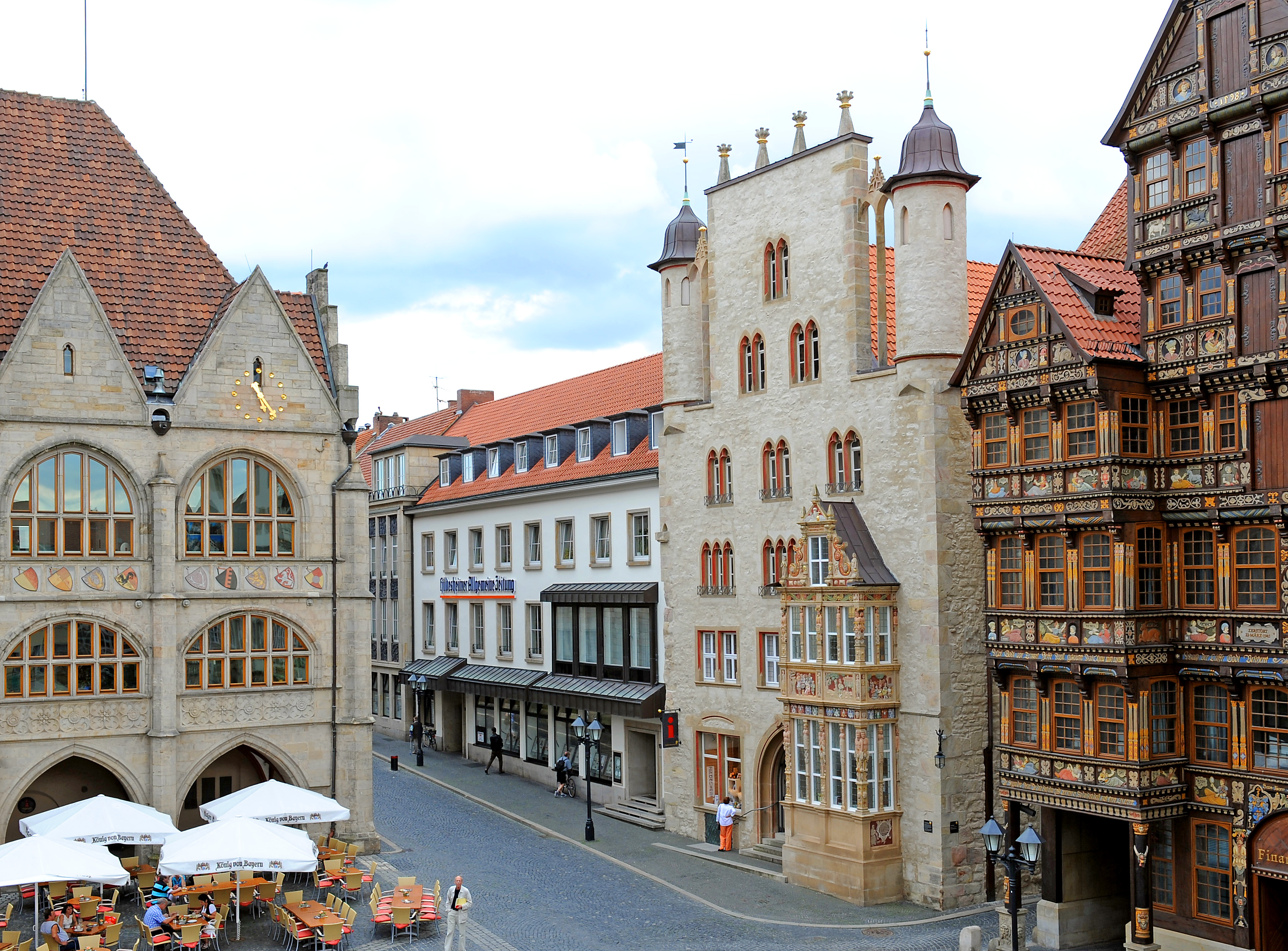 Das Verlagsgebäude der HAZ am historischen Marktplatz in Hildesheim.